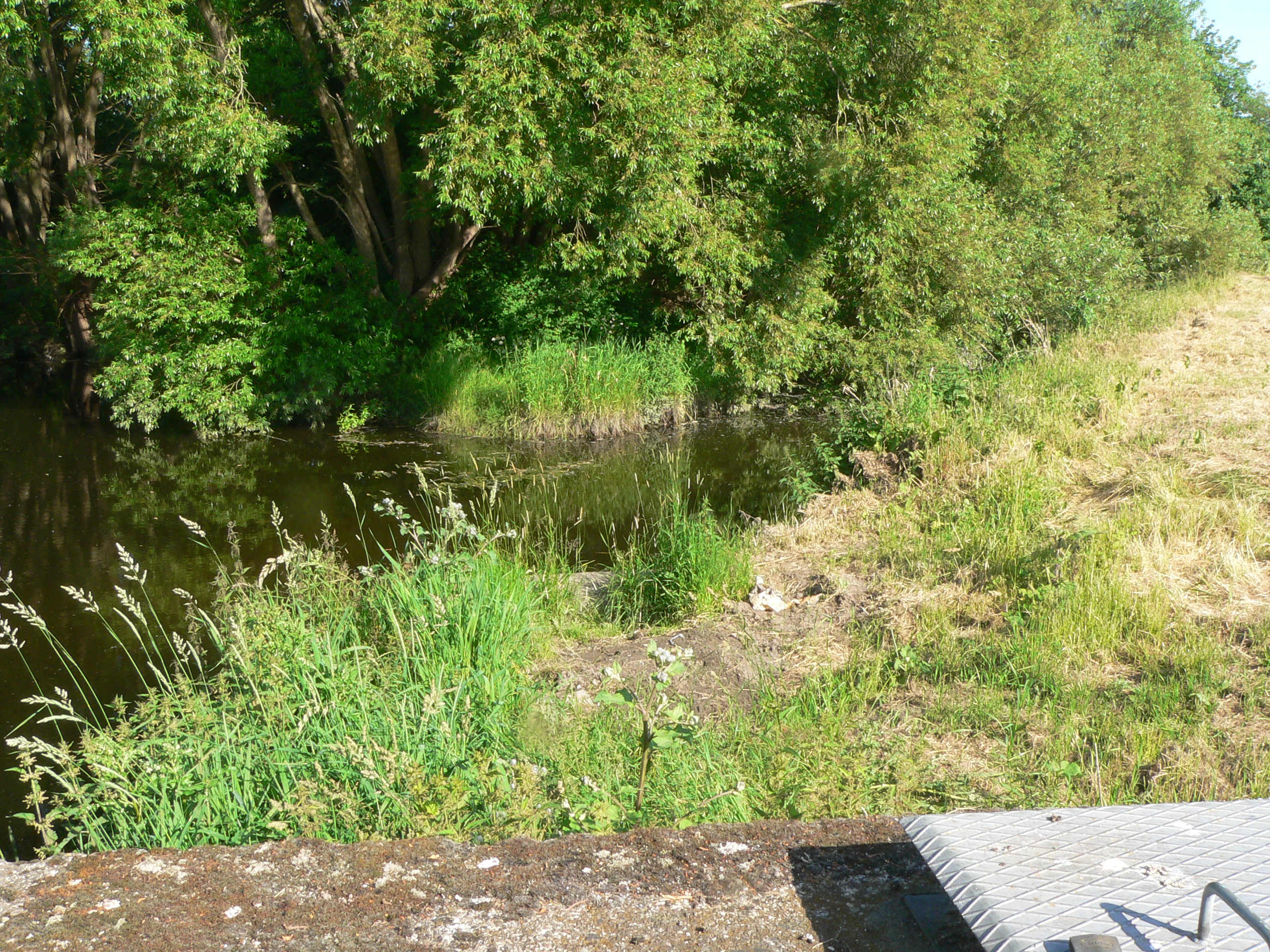 Risebergabäckens sammanflöde med Sege å. Bäcken kommer snett uppifrån från höger (söderifrån), ån snett uppifrån från vänster (österifrån) och fortsätter snett nedåt åt vänster (norrut).